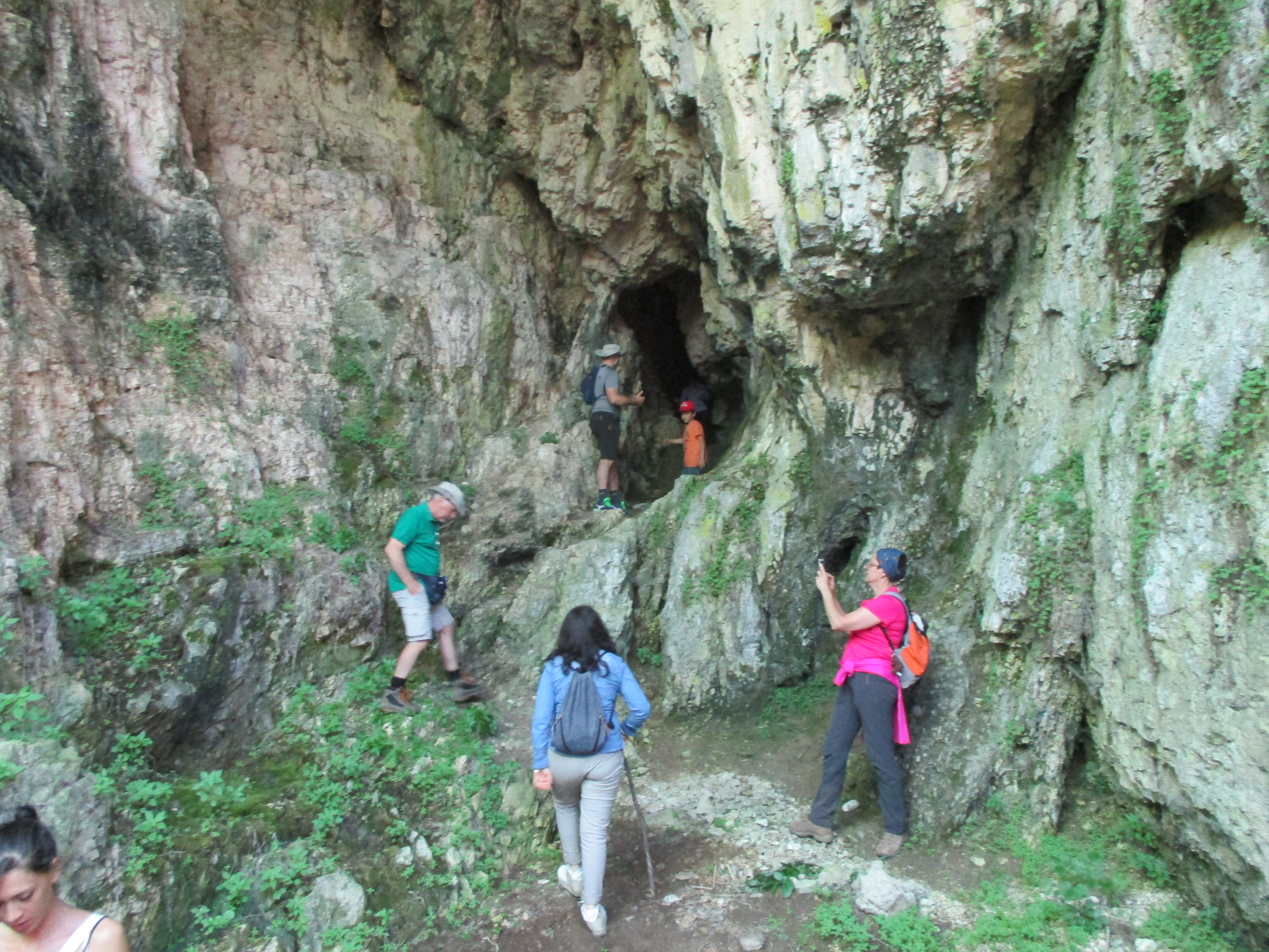 Visita guidata in grotta